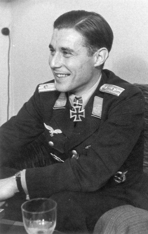 Oberleutnant Prinz zur Lippe-Weißenfeld, Berichter: Obgefr. Blädtke.